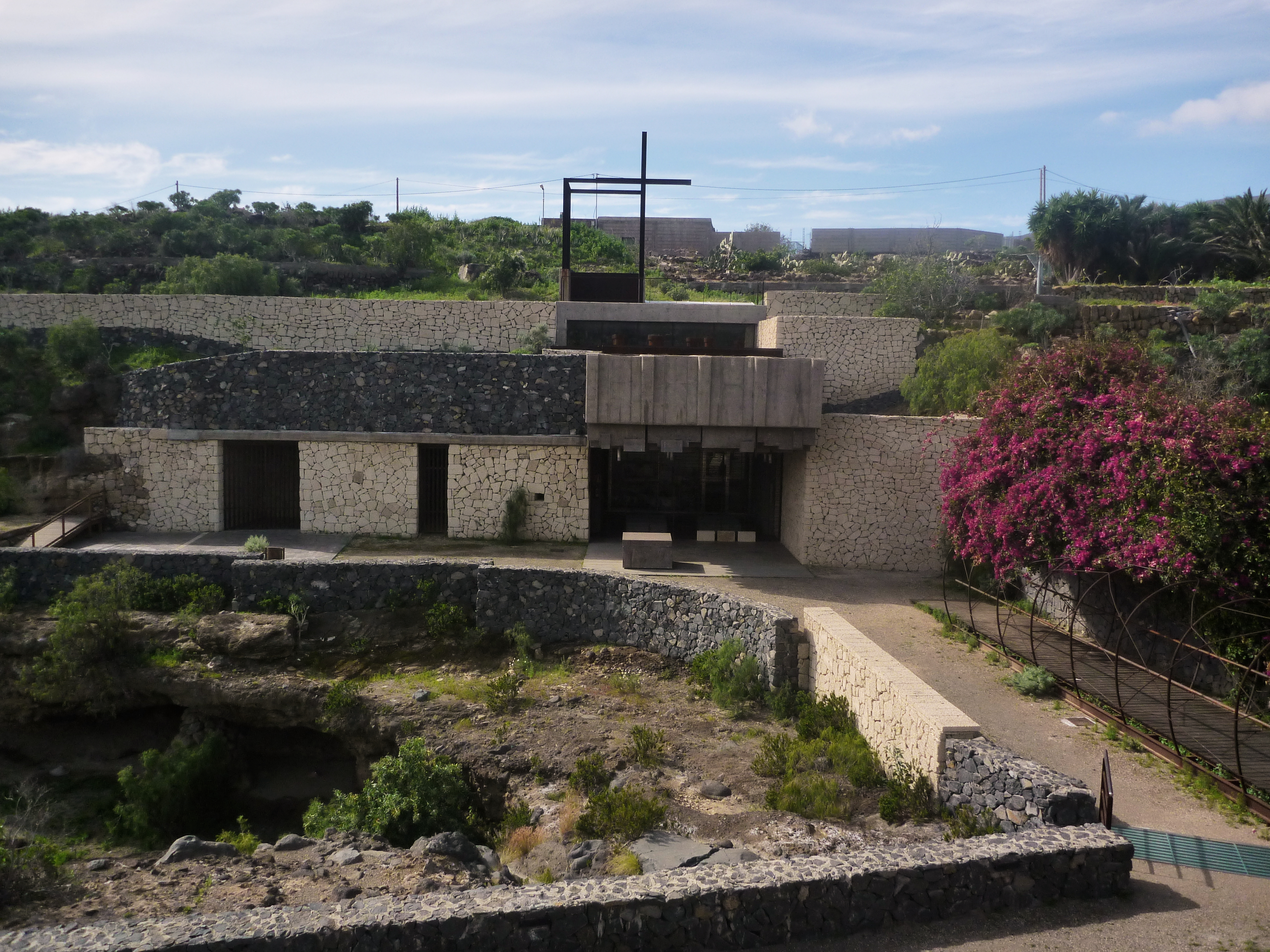 Sitio Histórico Complejo de Chinguaro, Güímar, Tenerife.